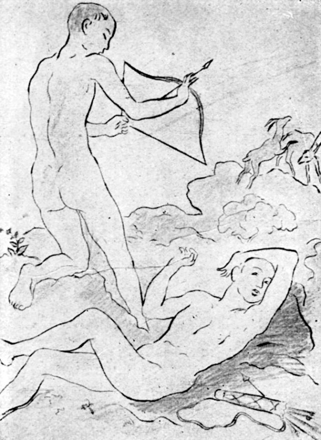 Illustration zu: Albius Tibullus: Das Buch Marathus. Elegien der Knabenliebe. Deutsche Nachdichtung von Alfred Richard Meyer. Gurlitt, Berlin 1928 (mit 5 Radierungen von Otto Schoff).